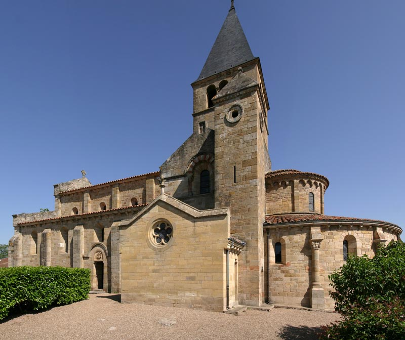 Vue générale de l'église de Bois-Sainte-Marie prise du sud